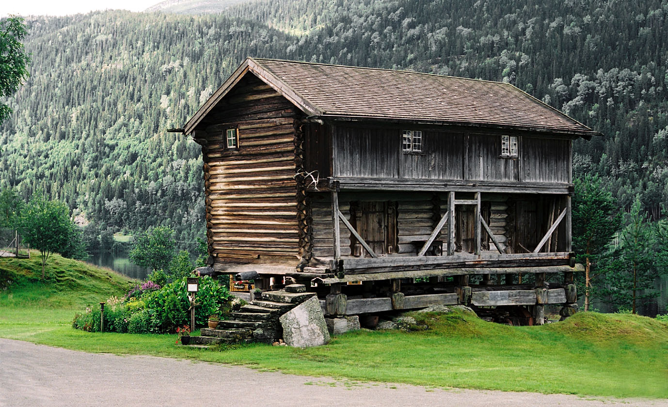 Kravikloftet. Nore og Uvdal, Buskerud, Norway.